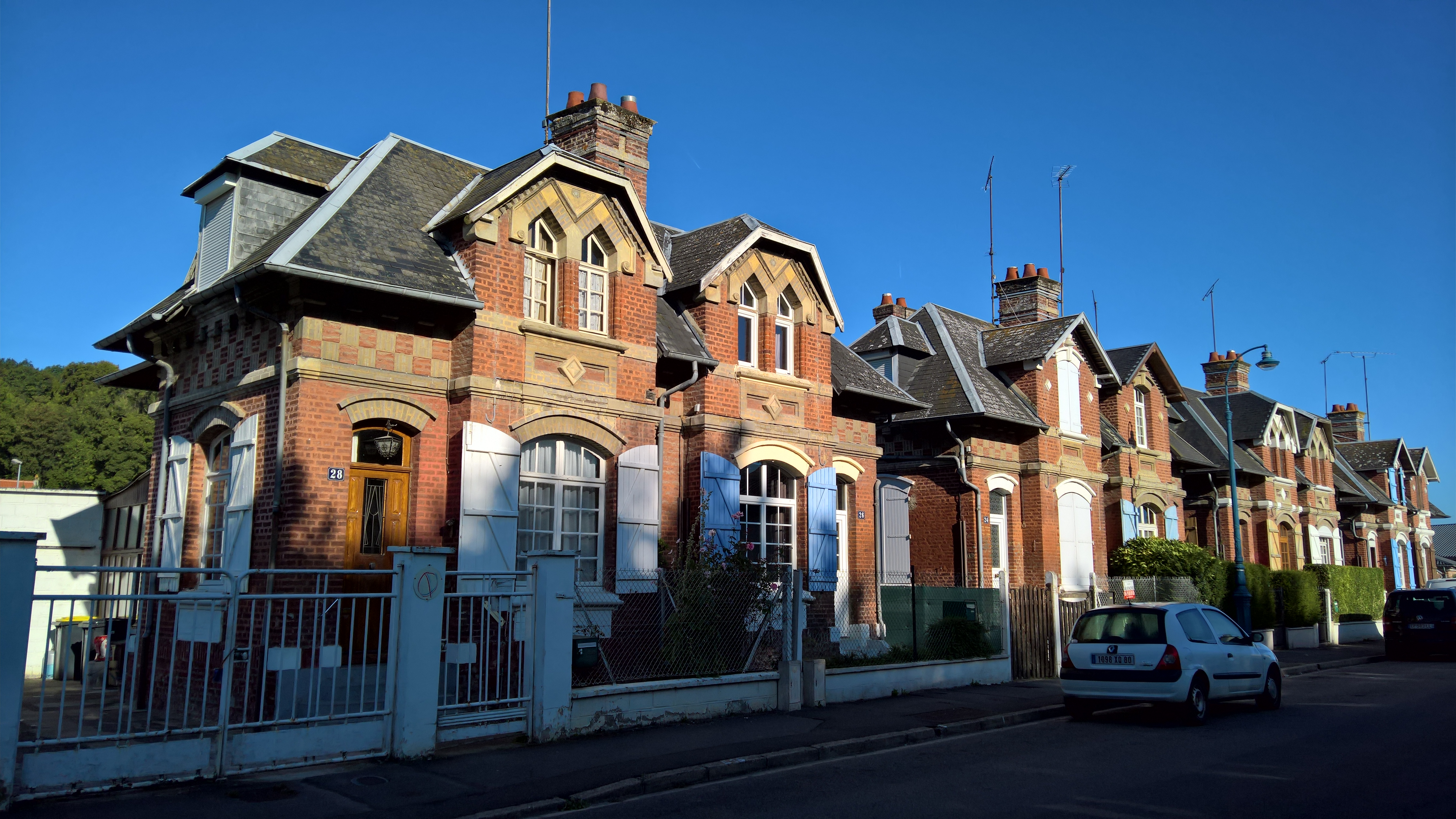 Conty : Le quartier anglais, rue des écoles